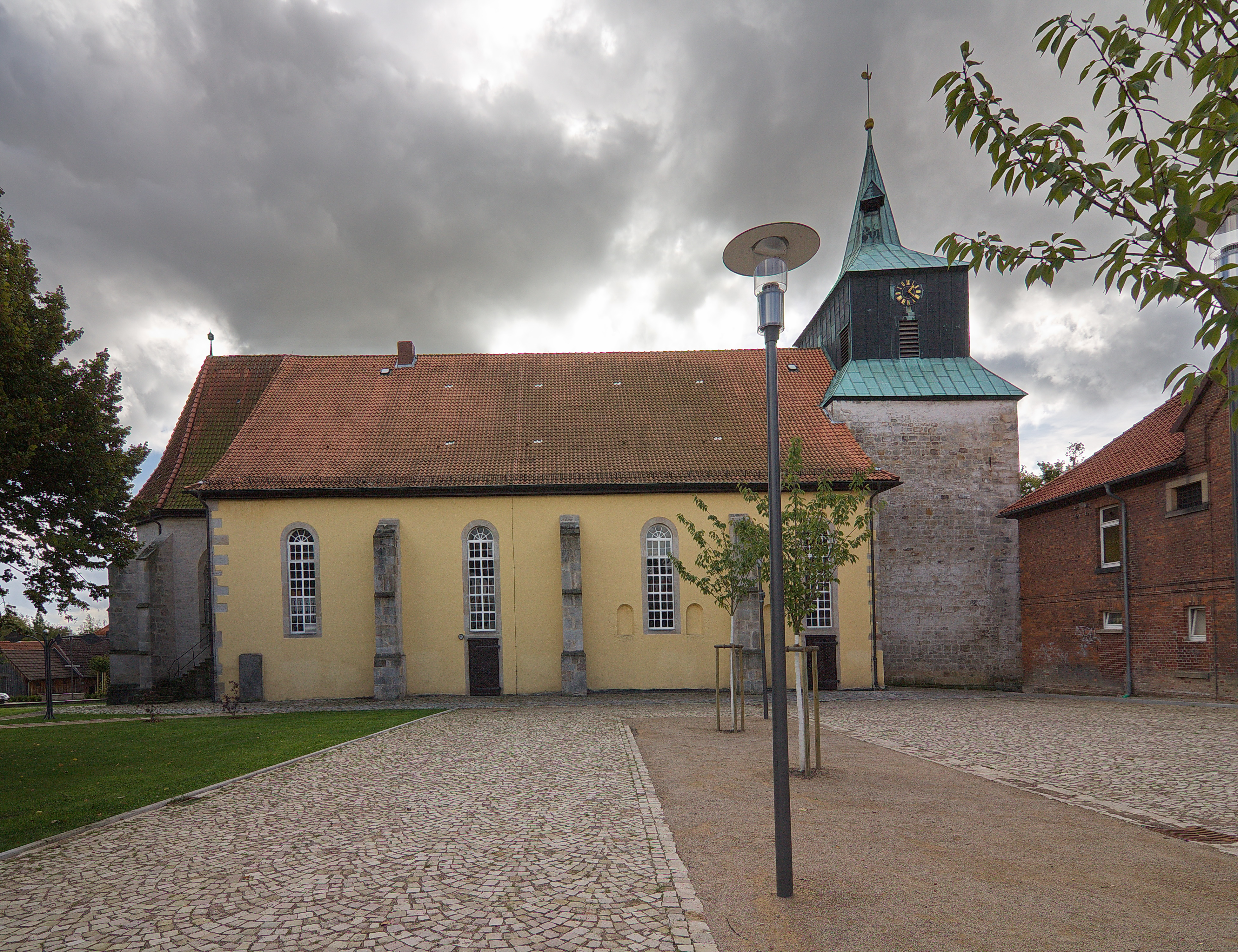 Kirche St.Alexandri am Marktplatz 2 in Eldagsen (Springe), Niedersachsen, Deutschland